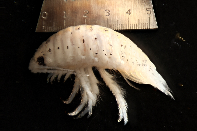 Excirolana chiltoni